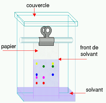 description : schéma d'une chromatographie sur papier source Image:Cromatography tank.png auteur user:Theresa knott